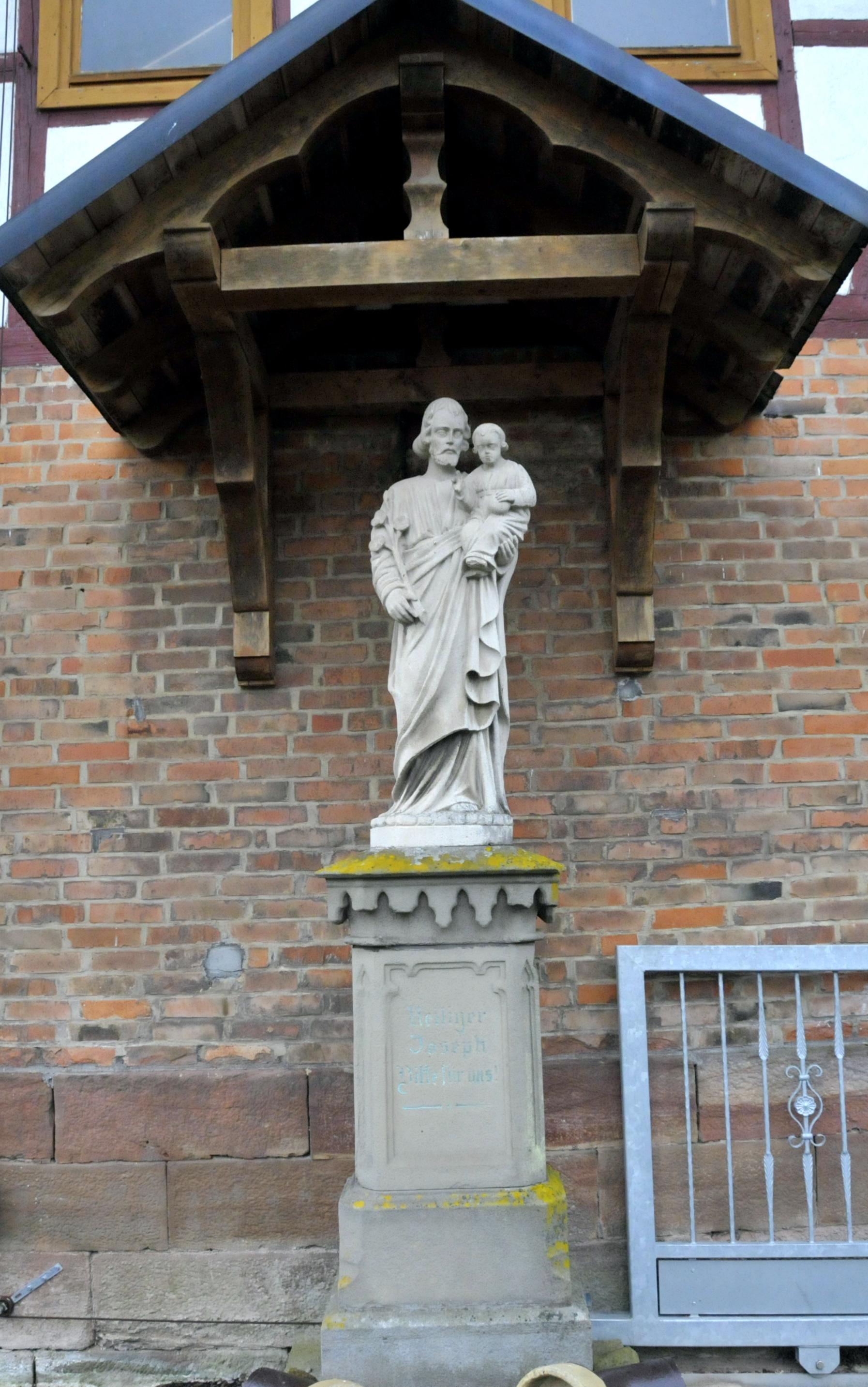 Mieswarz (Buttlar), St.-Josephs-Statue